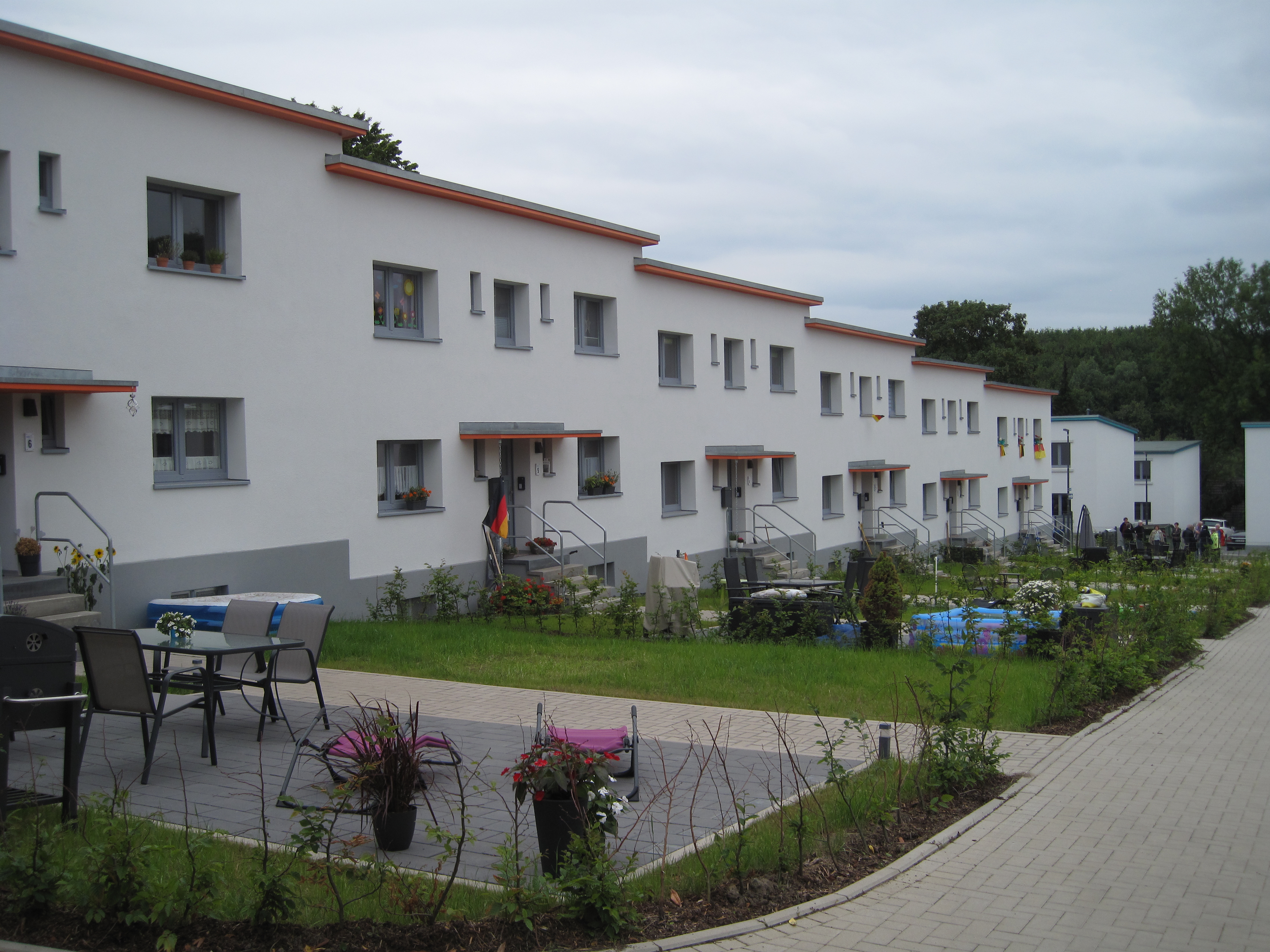 Schlieperblock (Frontansicht der restaurierten Gebäude Drosselweg 1-5) in Iserlohn. This image shows a heritage building in Germany, located in the North Rhine-Westphalian city Iserlohn (no. 230).